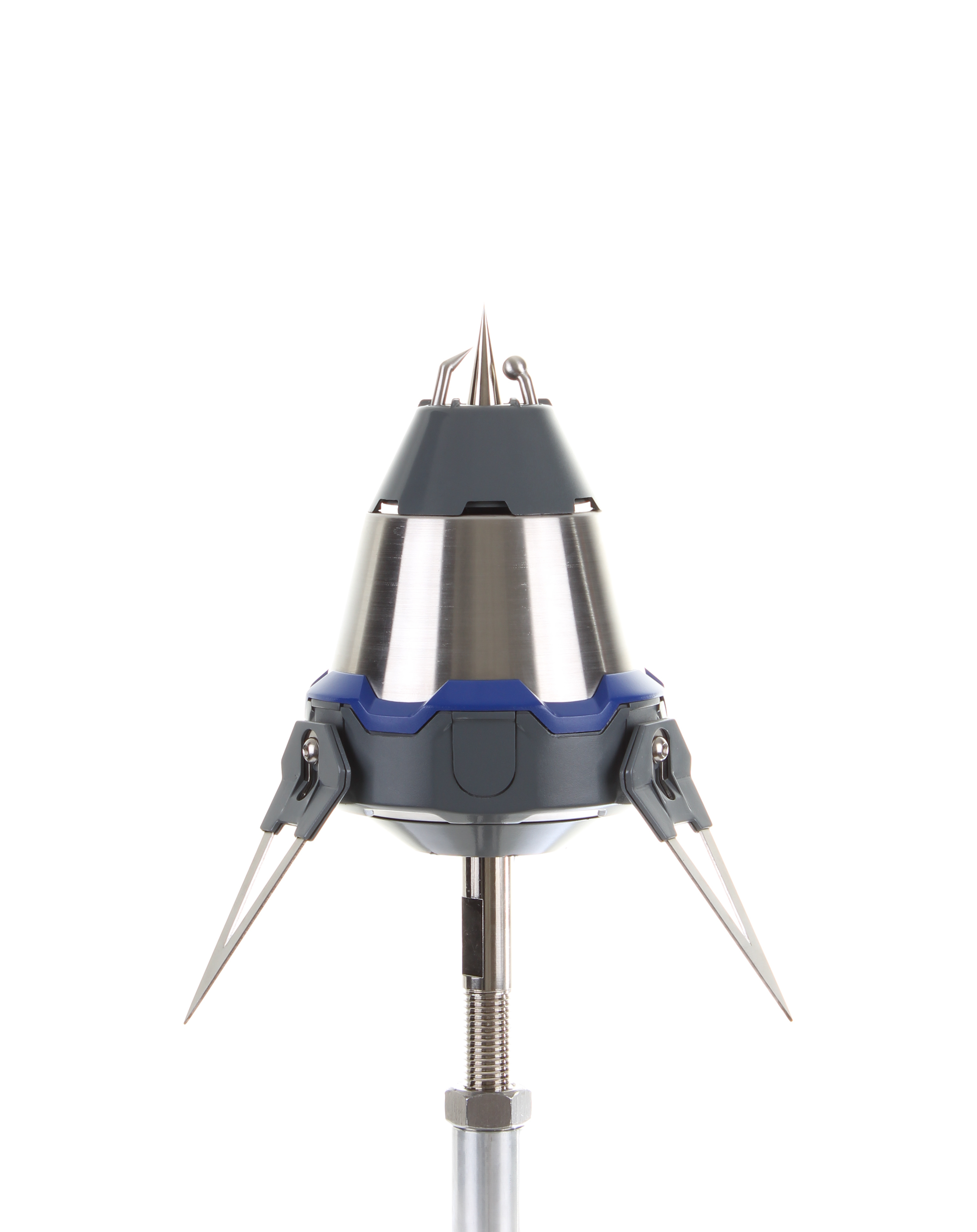 Prevectron 3S25 от INDELEC